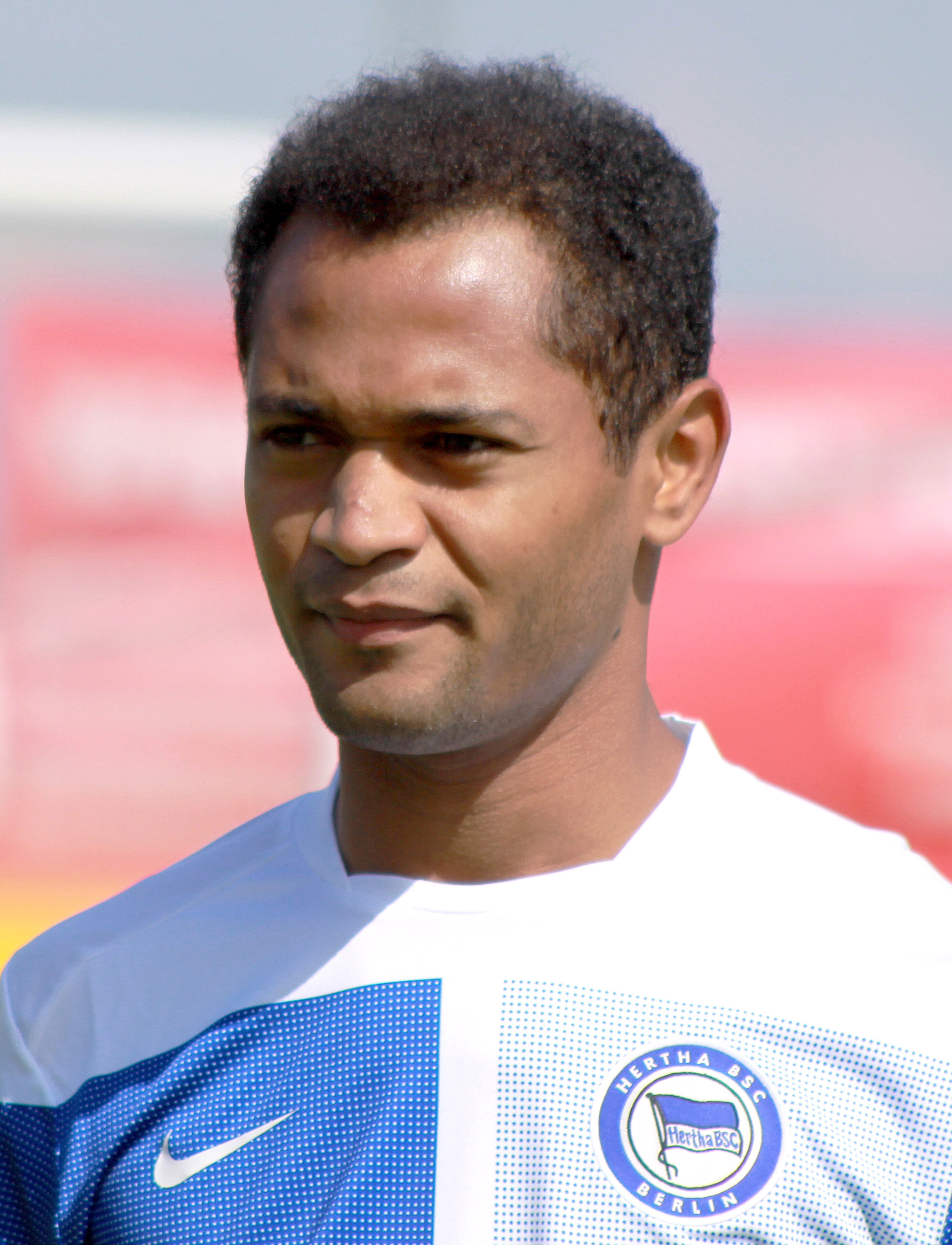 Raffael Caetano de Araújo (Raffael) - Hertha BSC Berlin (1)